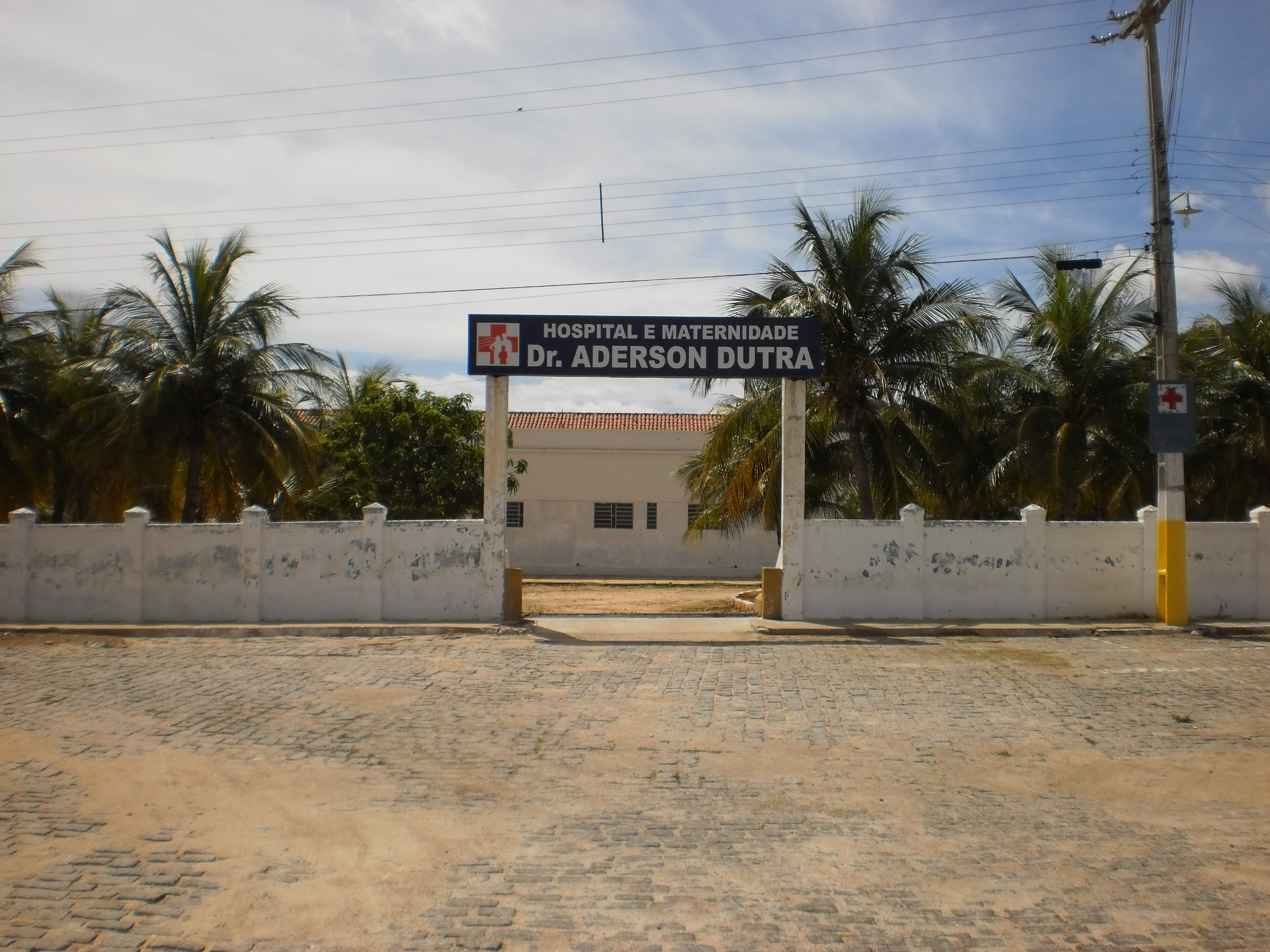 Hospital e Maternidade Dr. Aderson Dutra - Patu, Rio Grande do Norte, Brasil.